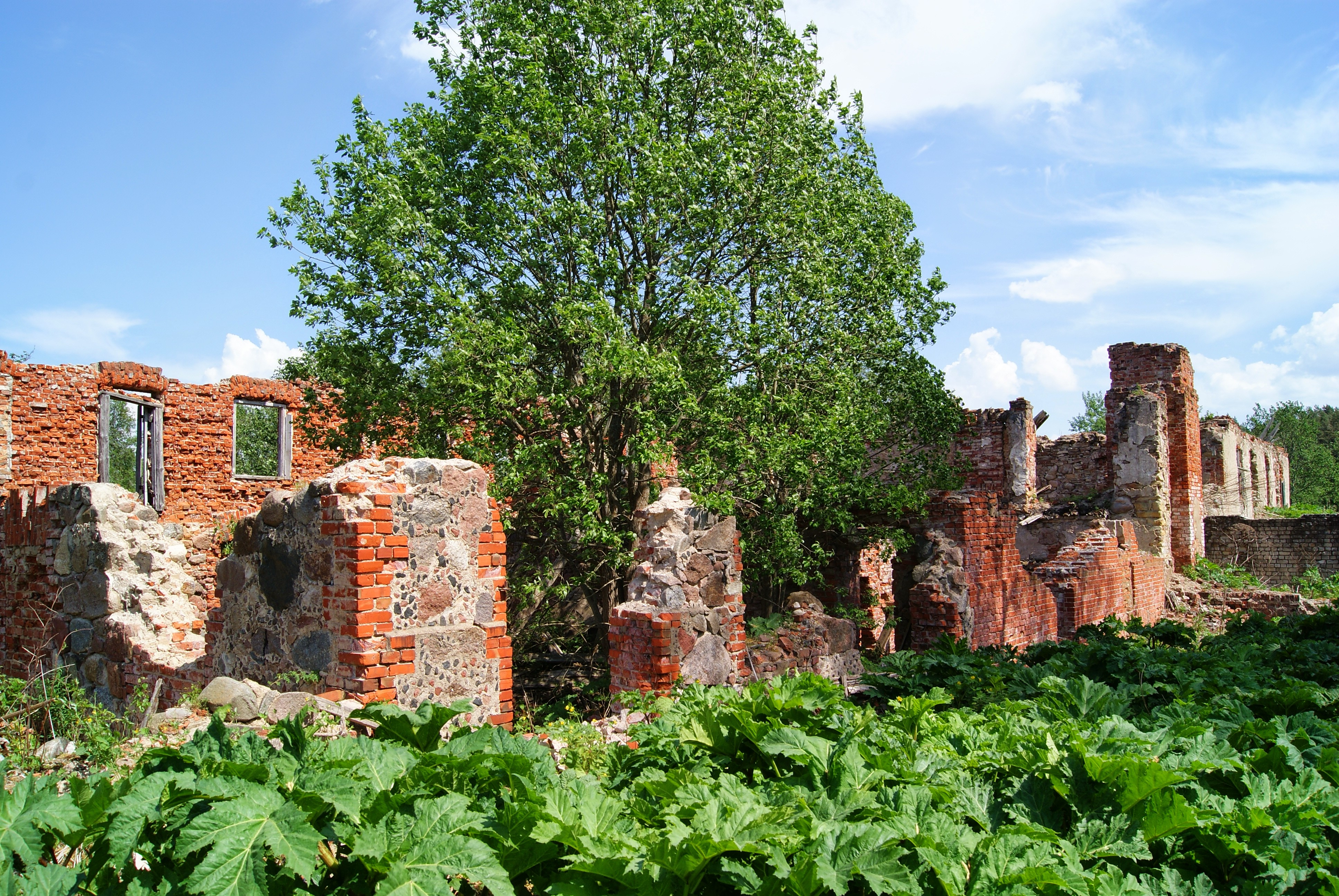 Saļienas ūdensdzirnavas (watermill)